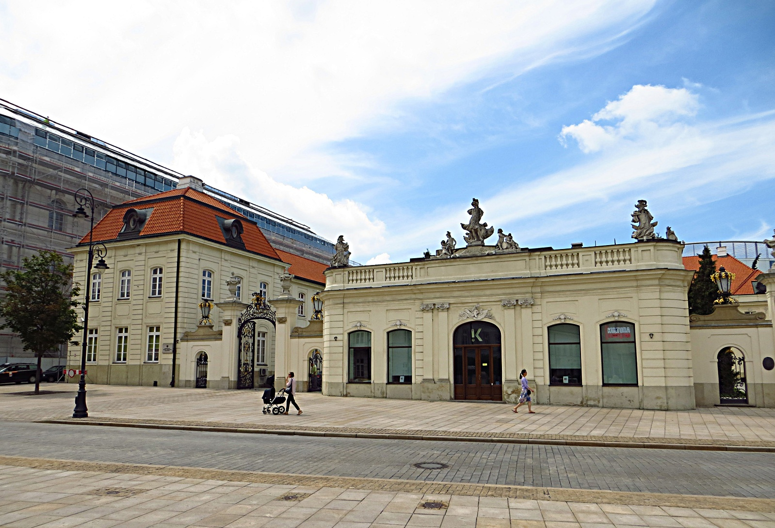 Galeria Kordegarda